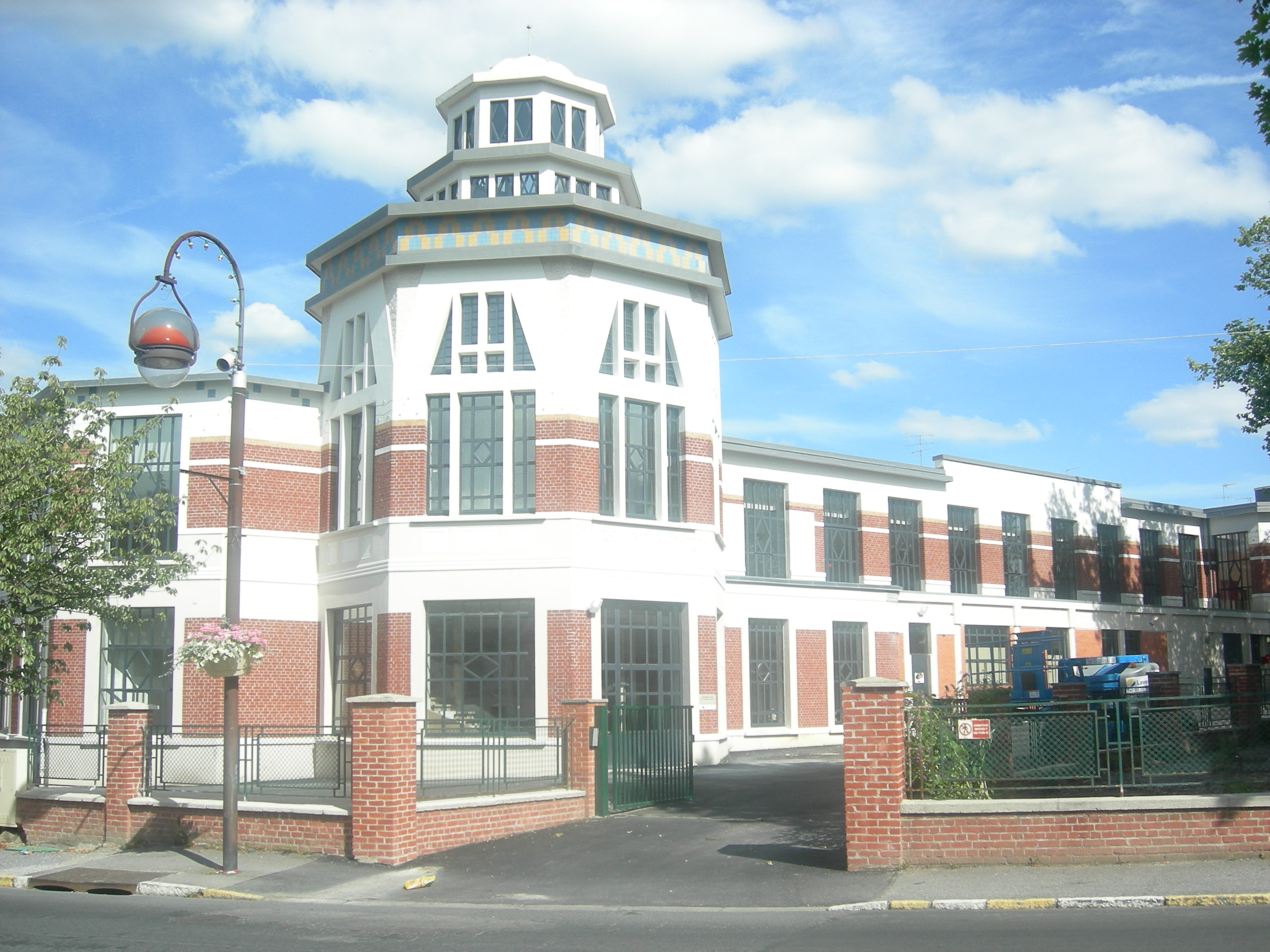 Maison de santé Albert Riche, dépendant du centre hospitalier Schweitzer de Jeumont